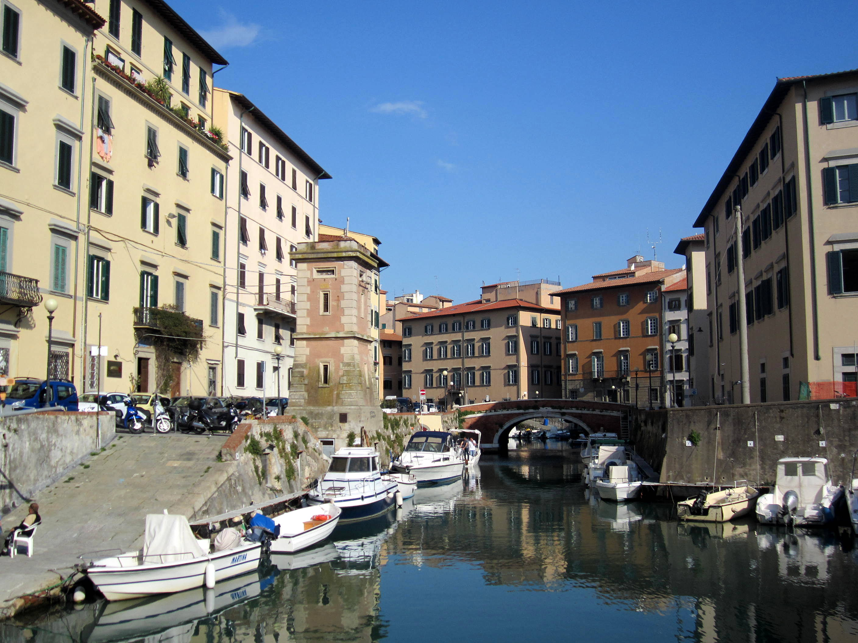 Scali del Ponte di Marmo e degli Isolotti a Livorno